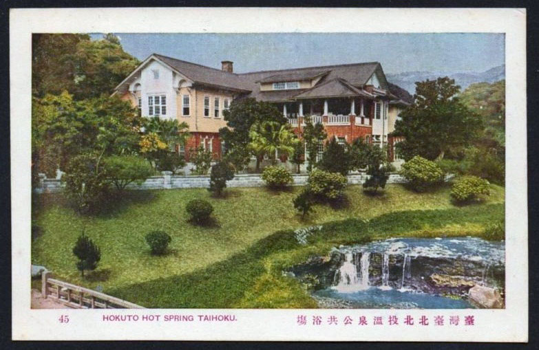 臺灣臺北北投溫泉公共浴場